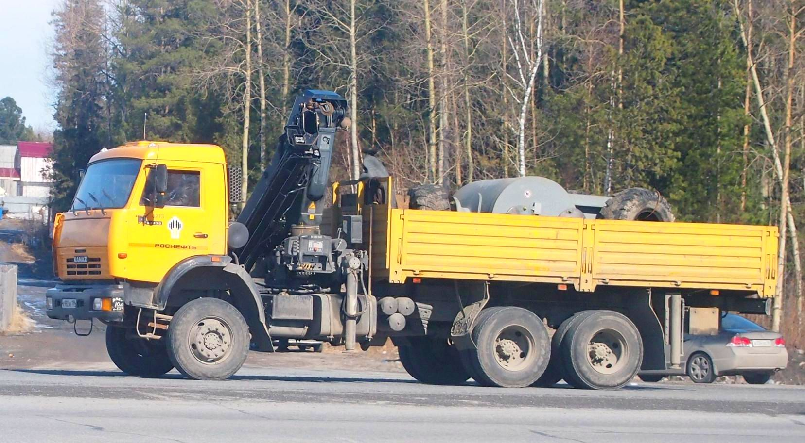 КАМАЗ-53228 в Ханты-Мансийске